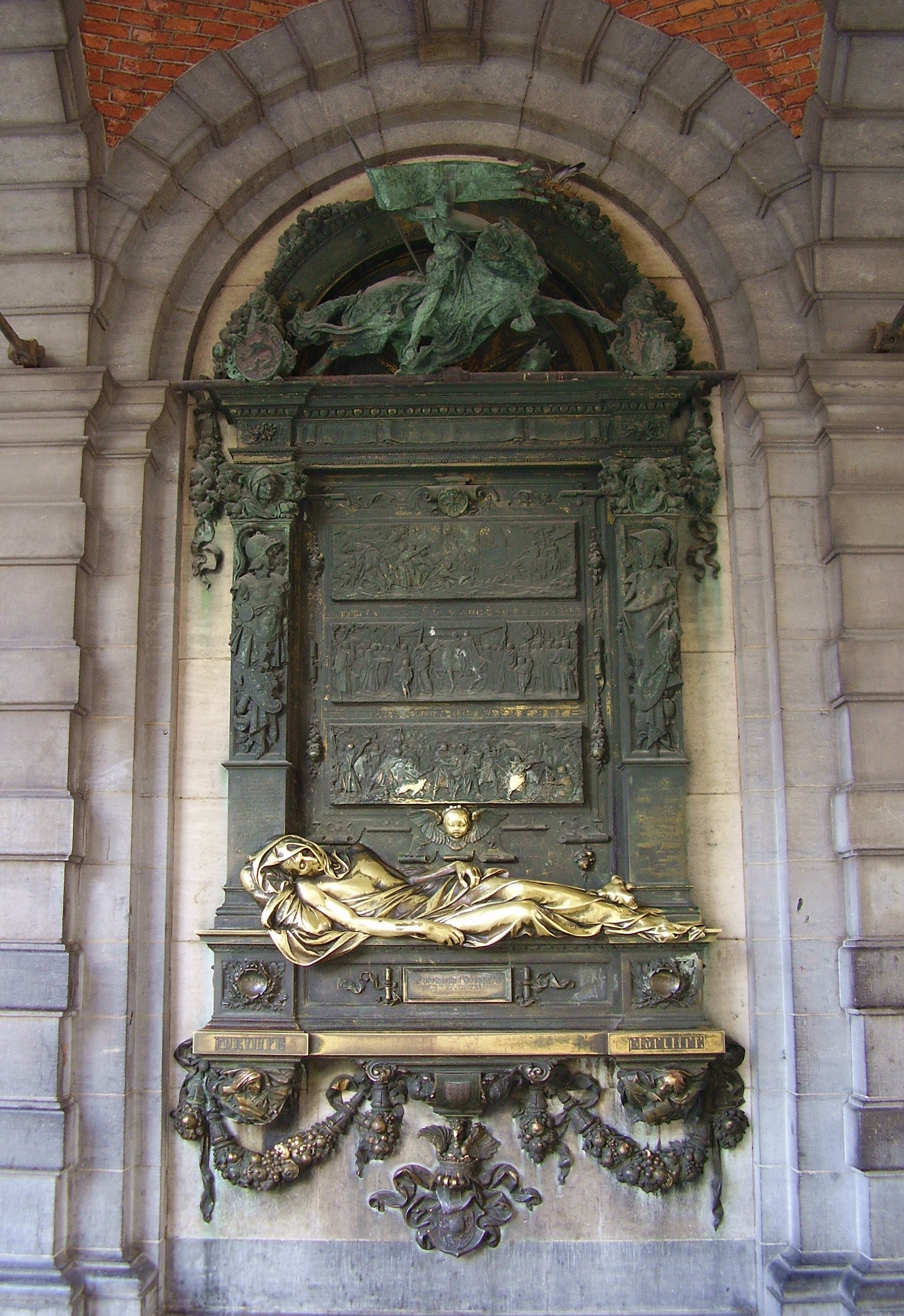 Description: Monument à Everard t'Serclaes abord de la Grand Place de Bruxelles sous la maison de l'Étoile Author: User:Ben2 Date of creation: 31 mai 2006 Source: Photo personnelle